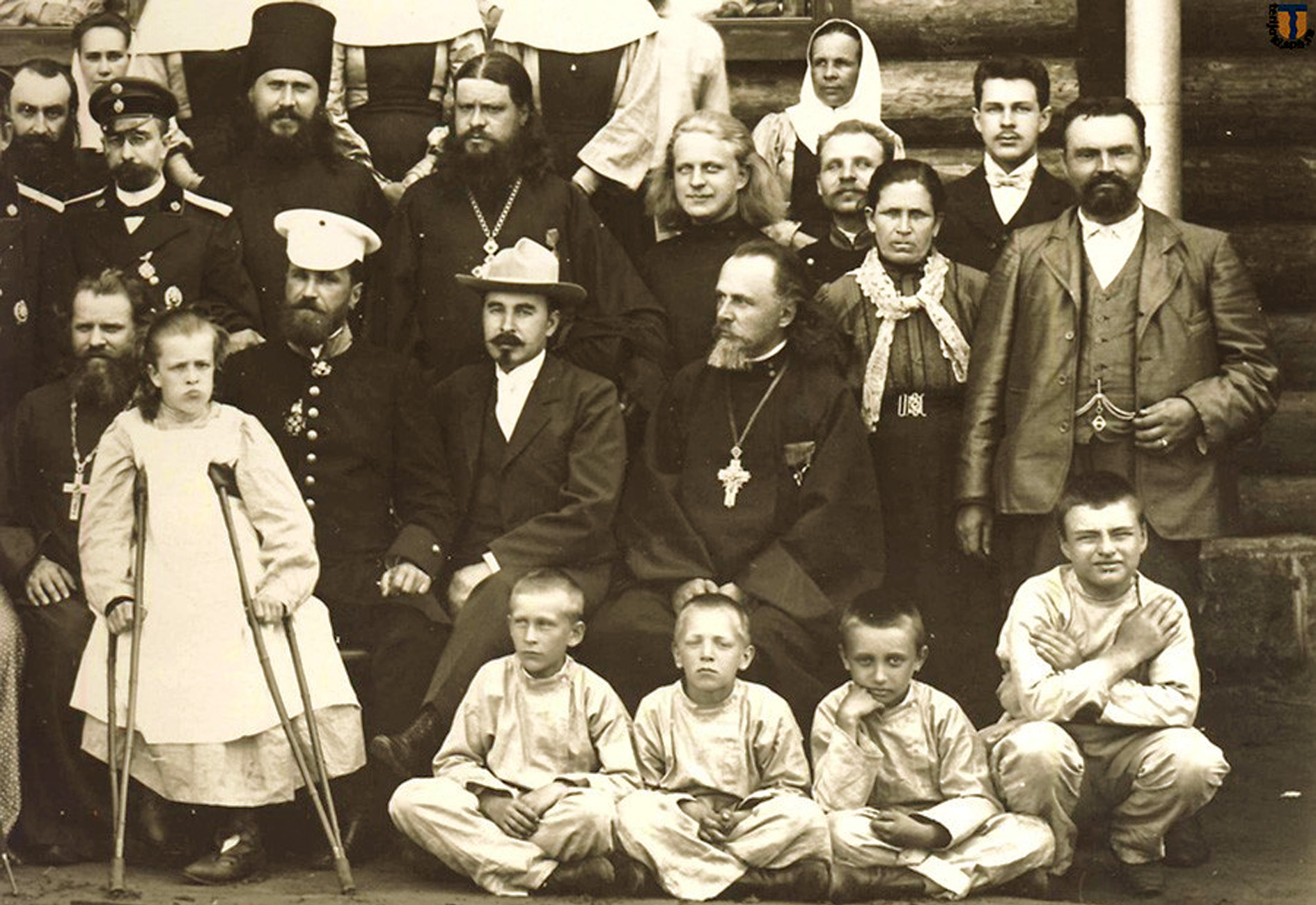 Приют братства во имя Царицы Небесной для детей-идиотов и эпилептиков, который был открыт в 1903 году на станции Райвола